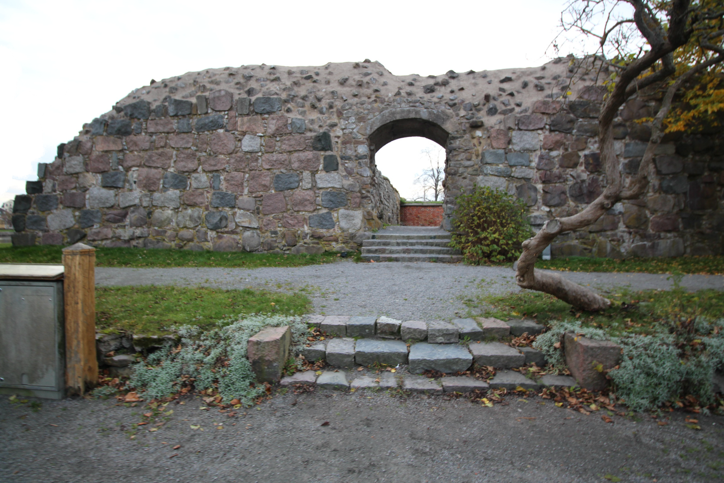 Stegeholm (Västervik 51:1)